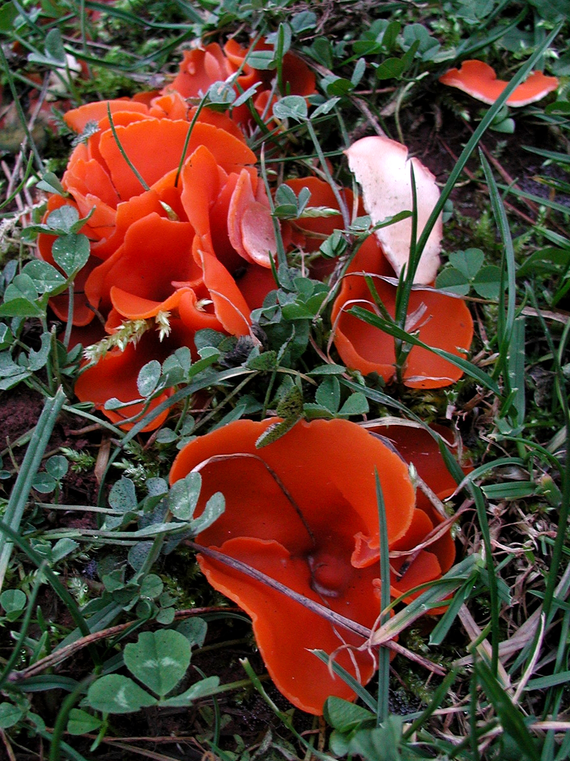 Orangerote Becherlinge (Aleuria aurantia) auf einer Lichtung im Pfälzerwald